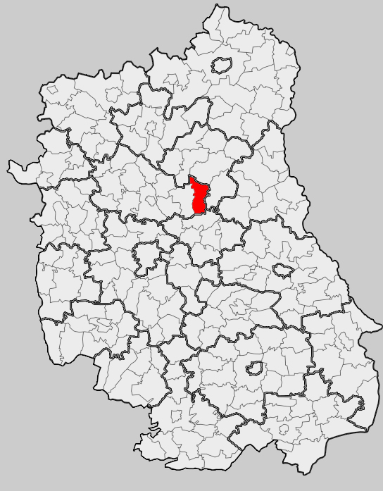 Map of gmina Uścimów, Lubartów county, Lublin voivodship Mapa gminy Uścimów, powiat lubartowski, województwo lubelskie